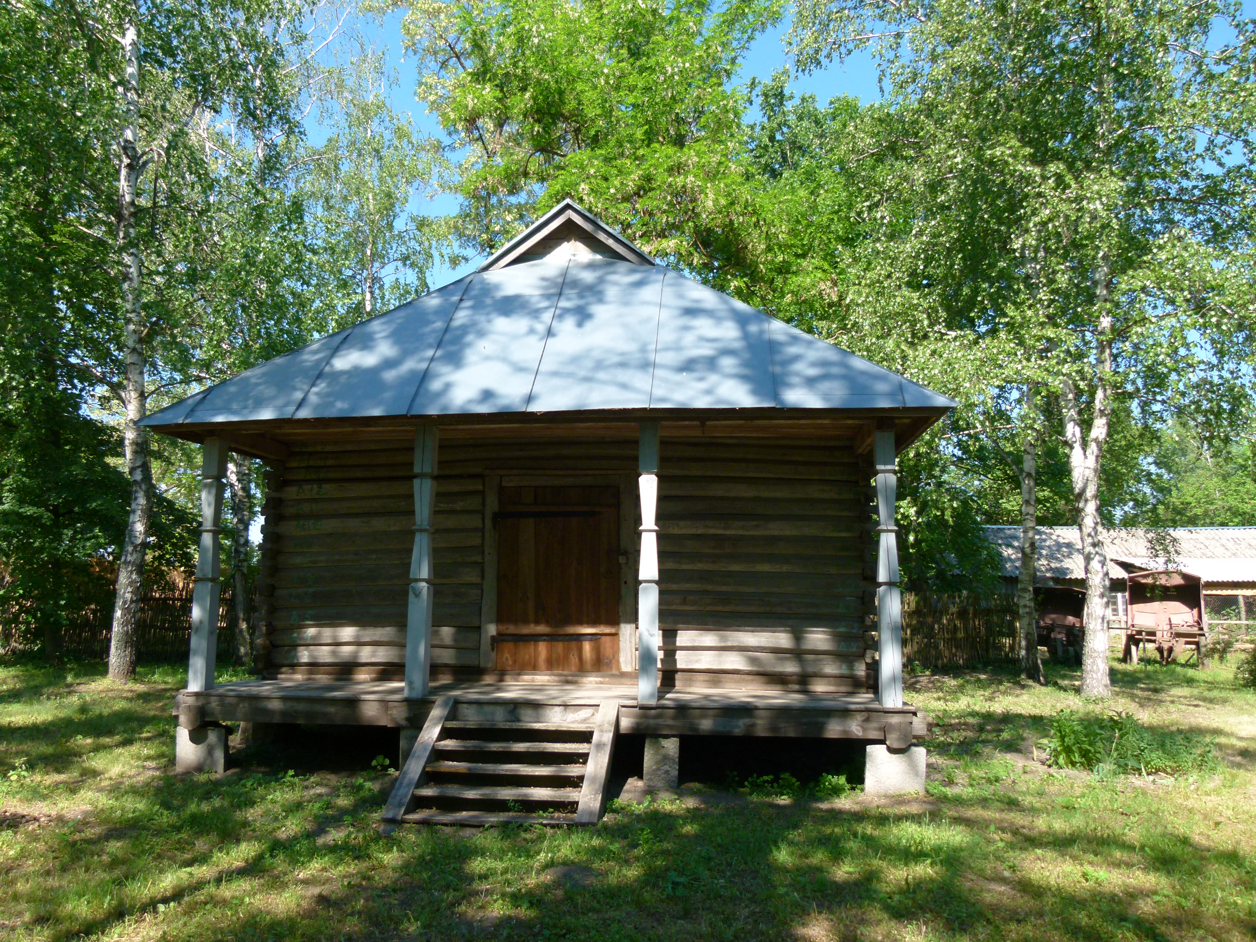 4. Комора лісного кордону., Музей історії лісового господарства